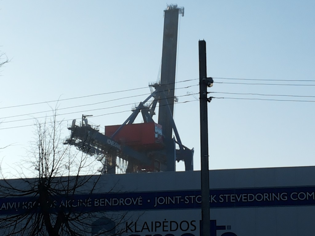 Klaipėdos Smeltė